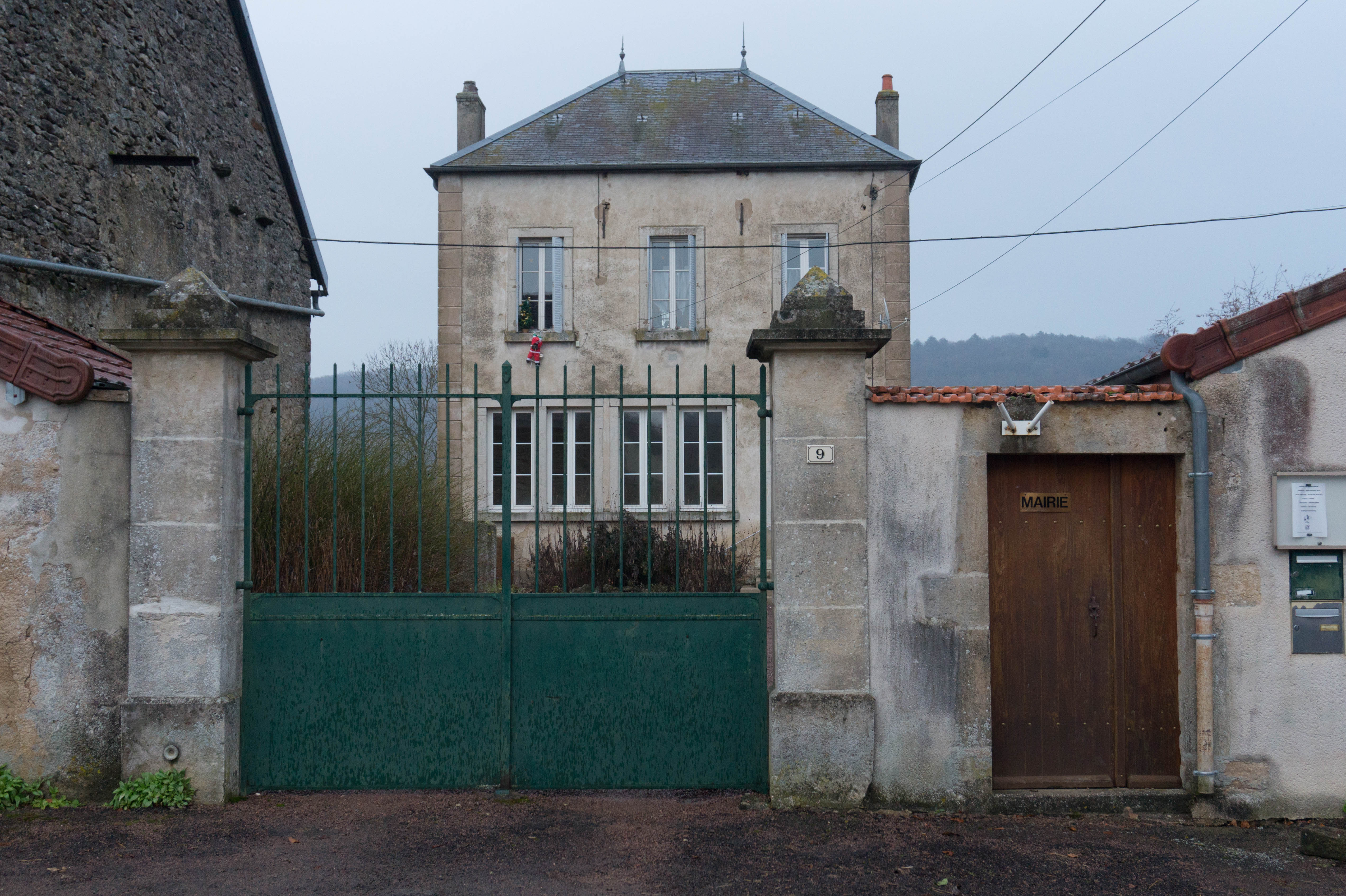 Mairie de Boussey